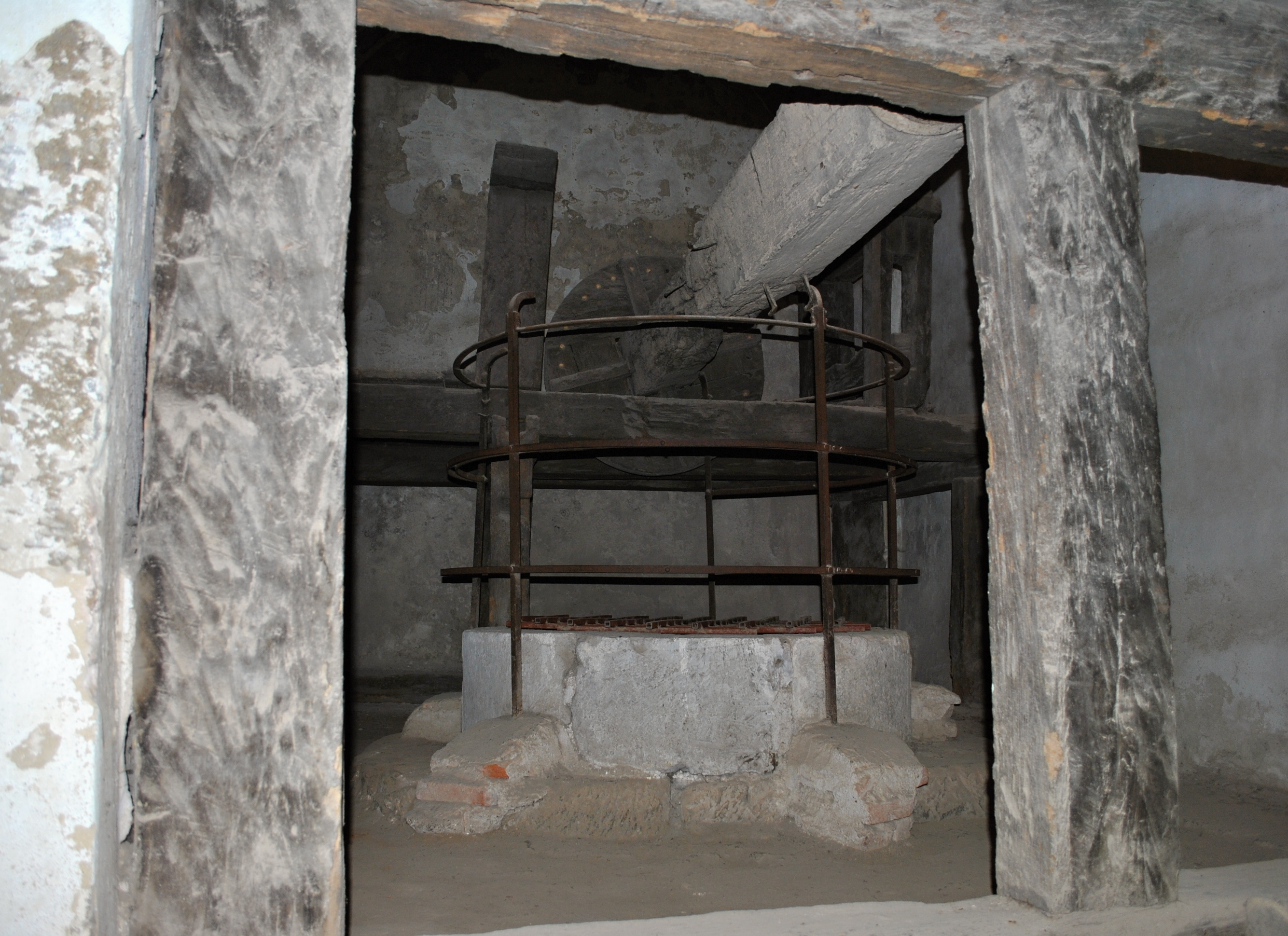 Studna hradná